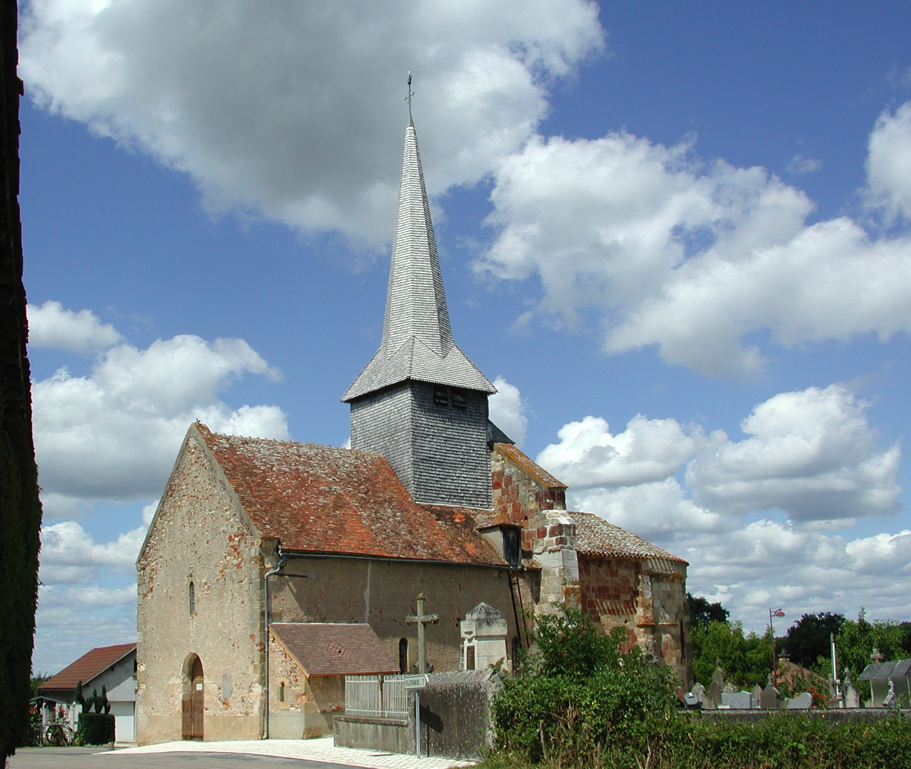 Église Saint-Romain (XIIe siècle) et cimetière à Tortezais (Allier, France).